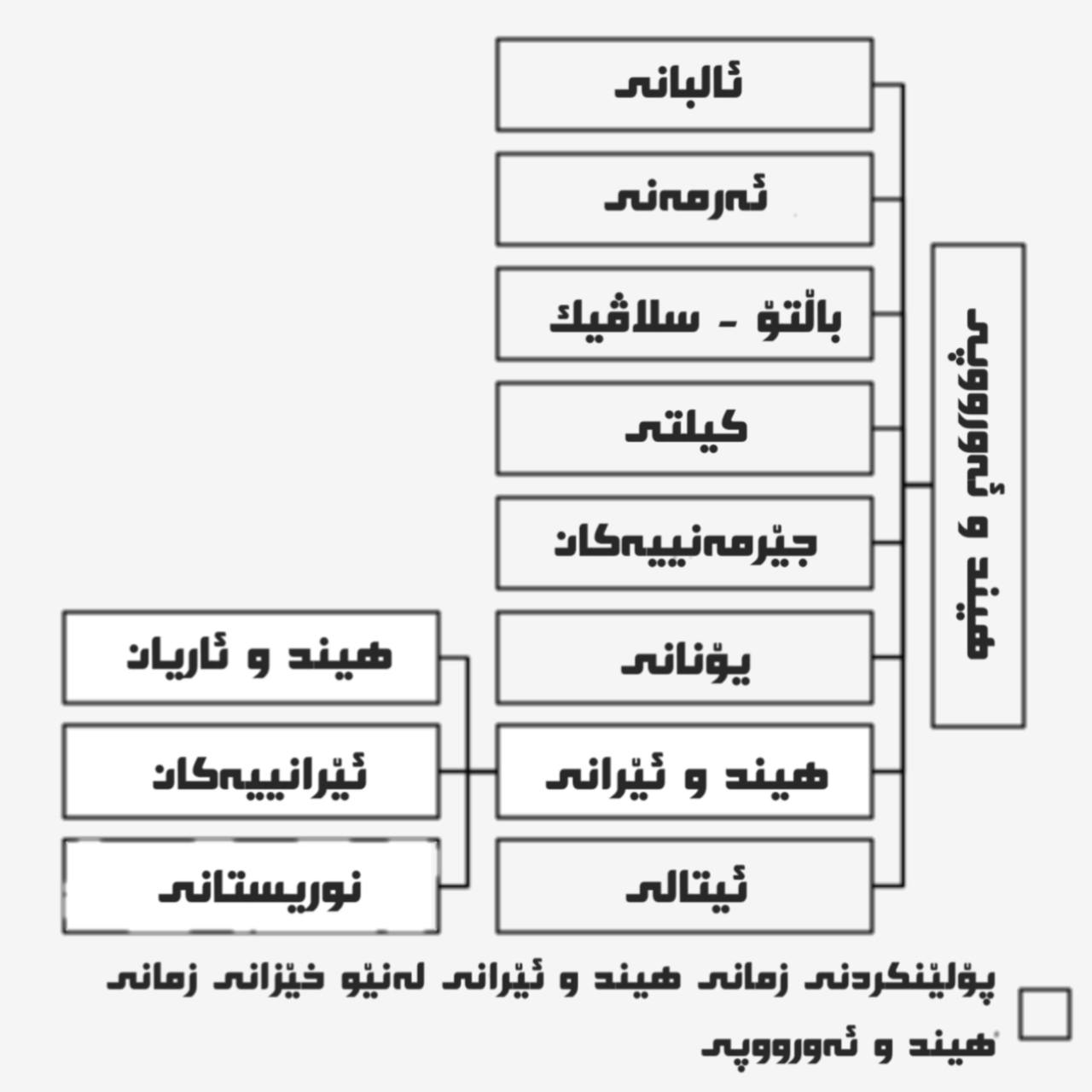 کوردی: ھێڵکاری پۆلێنکردنی زمانە ھیند و ئێرانییەکان لەنێو خێزانی زمانە ھیند و ئەورووپییەکان